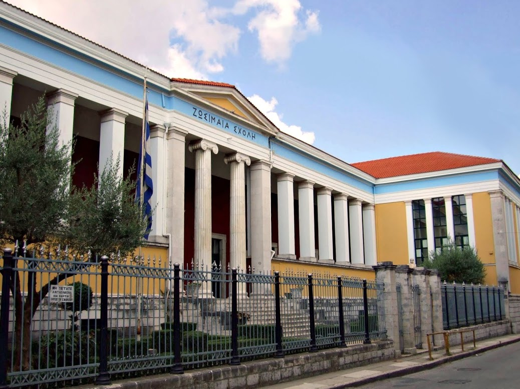 Die Zosimaia-Schule in der griechischen Stadt Ioannina wurde im Jahr 1828 gegründet. Mvskoke: 1ο Γυμνάσιο Ιωαννίνων